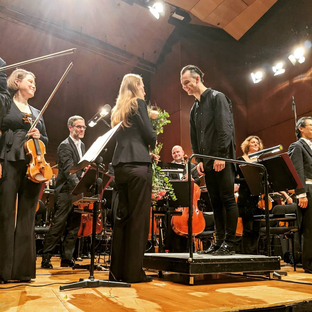 中文（中国大陆）: 2019年12月13日库仑奇思在斯图加特音乐厅同德国西南广播交响乐团合作演出马勒第九交响曲后